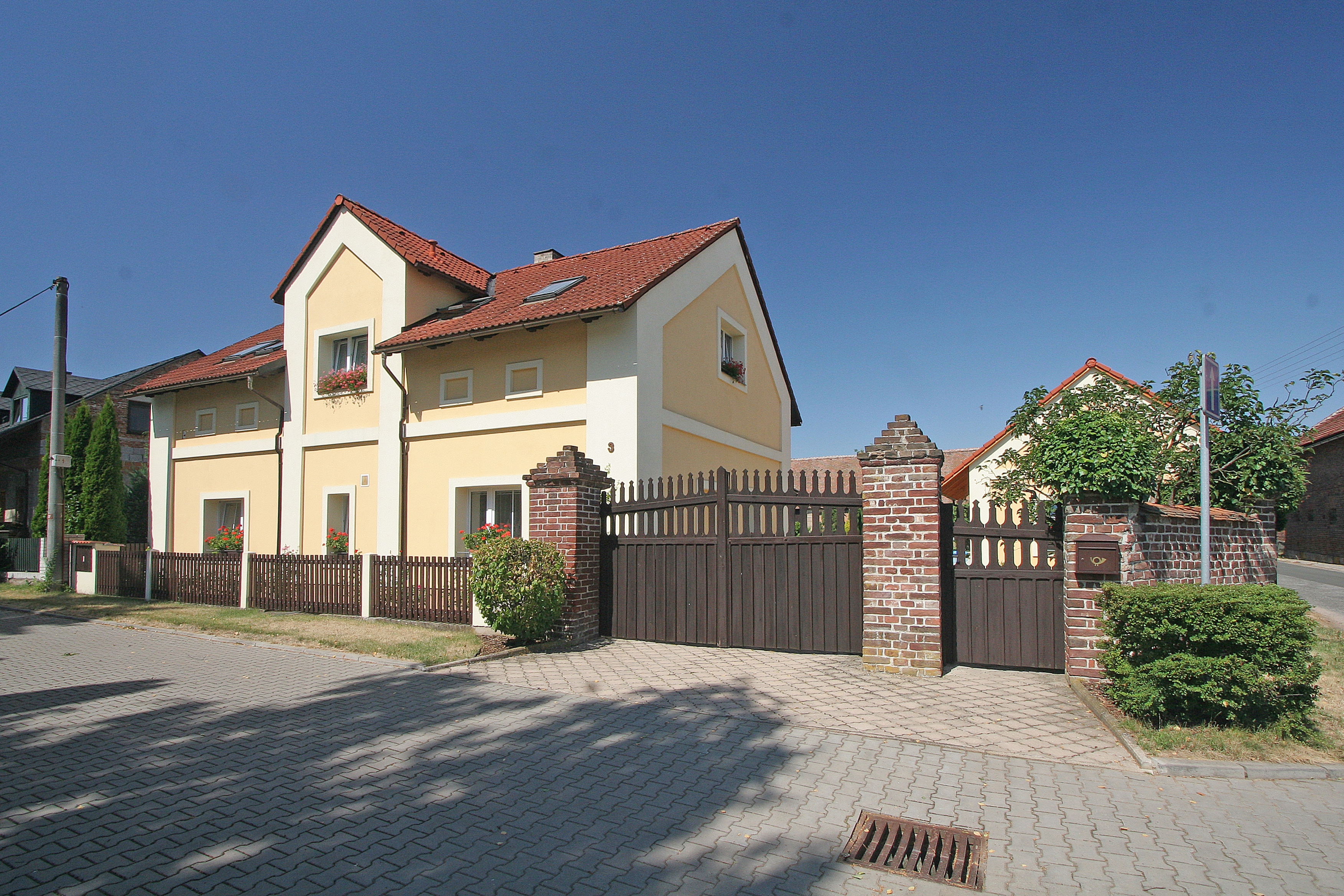 Bříza čp. 9